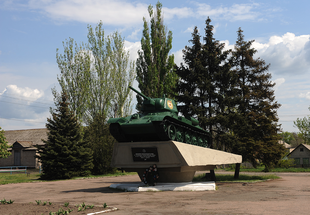 Освободителям Красного Лимана 1943